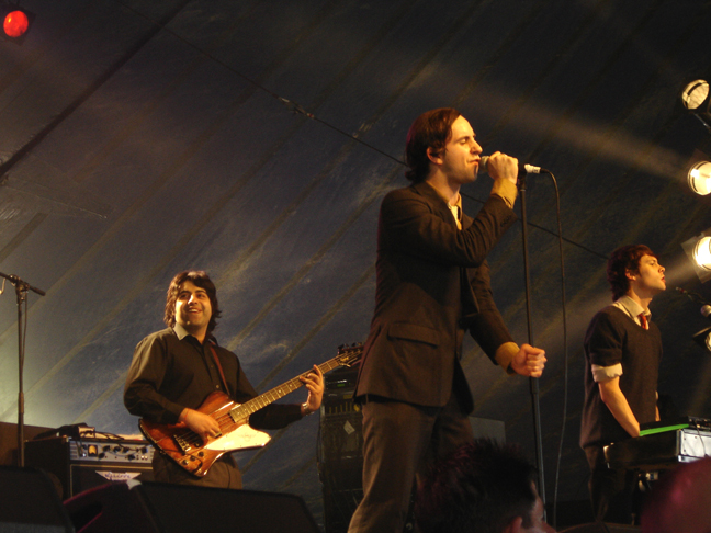 Maxïmo Park - Radio 1's One Big Weekend 2005